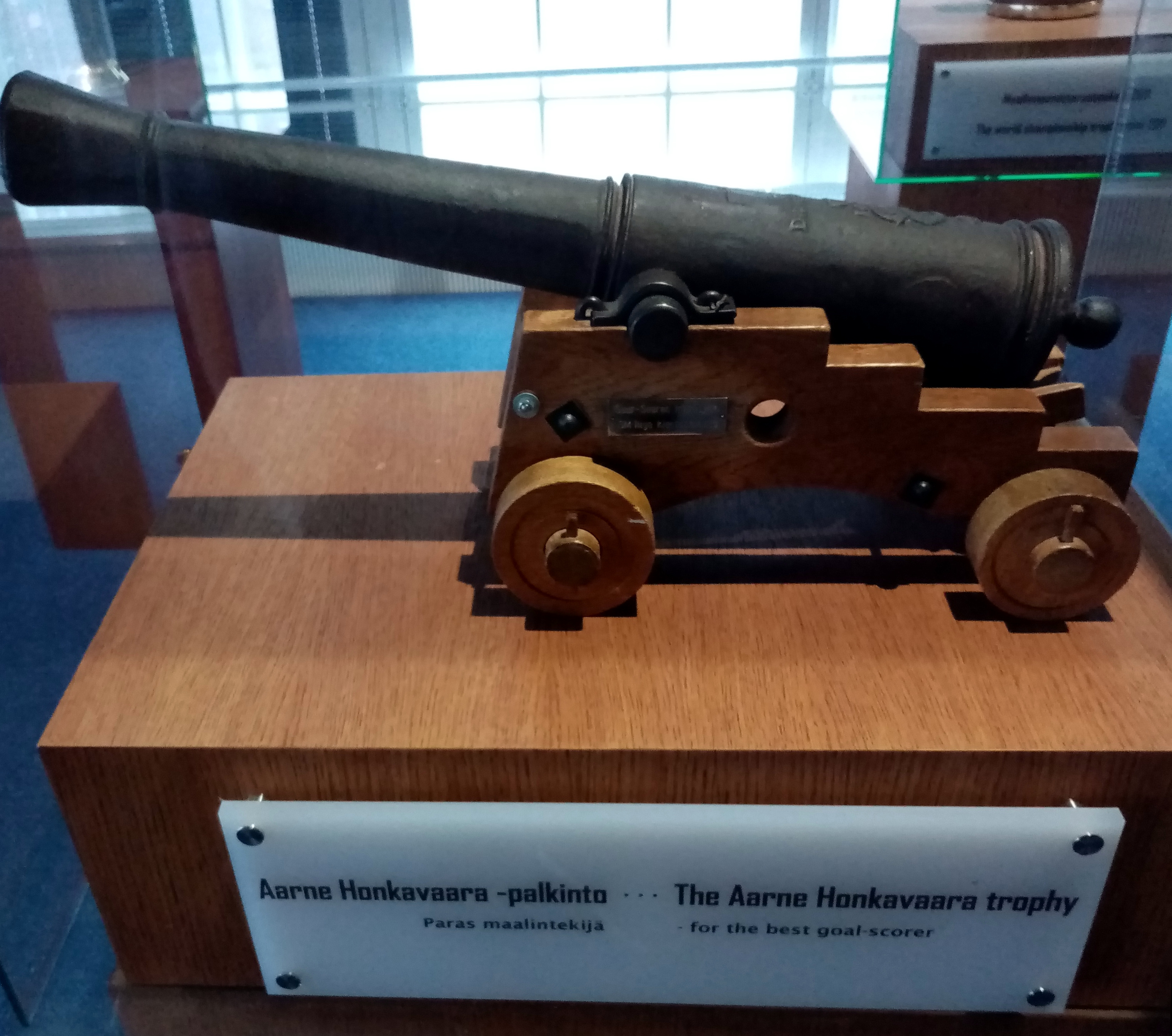 O Trofeo Aarne Honkavaara no Museo do Hóckey de Finlandia.